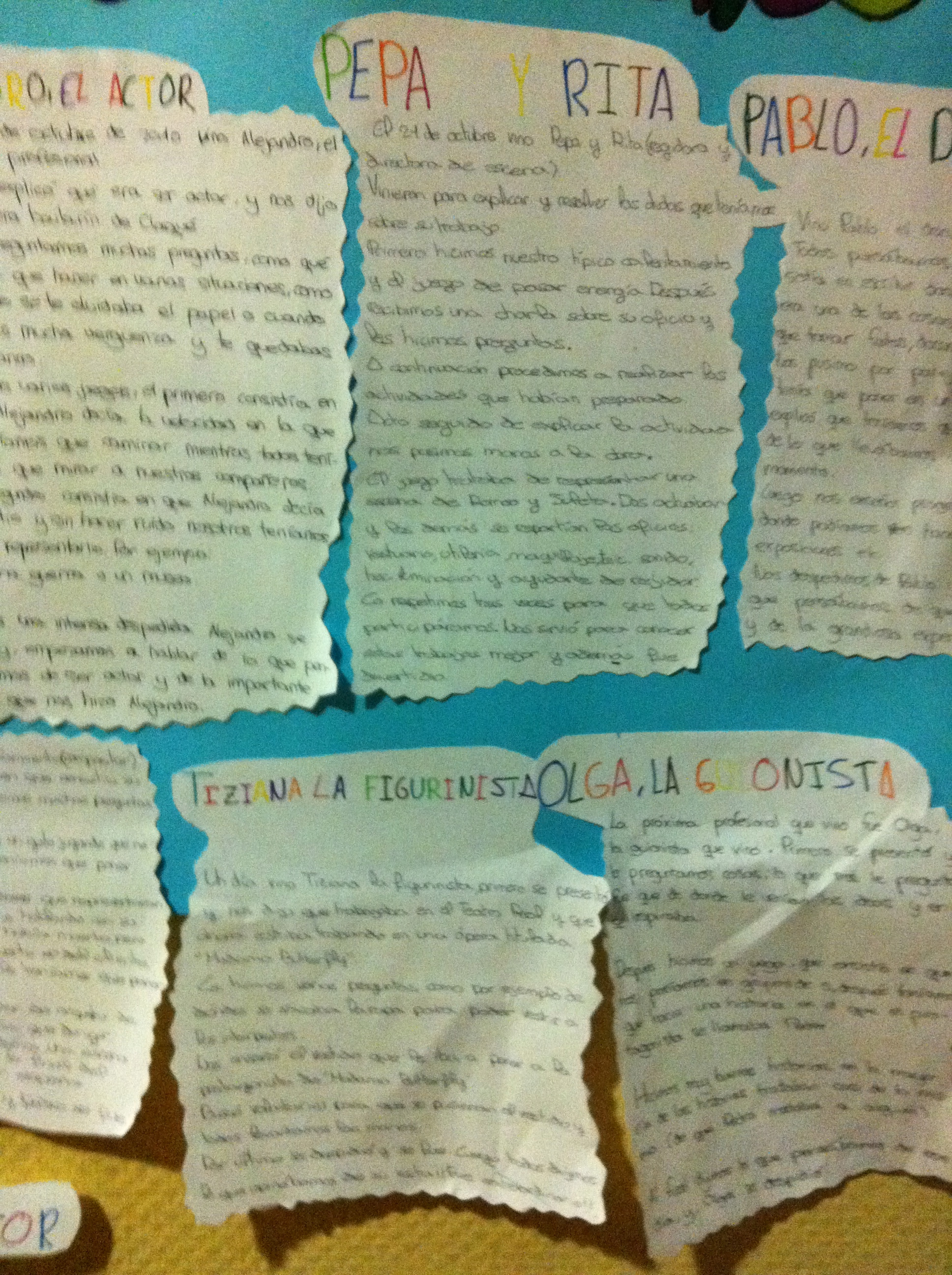 Descripción de los profesionales y profesiones que realizan los alumnos después de su visita.